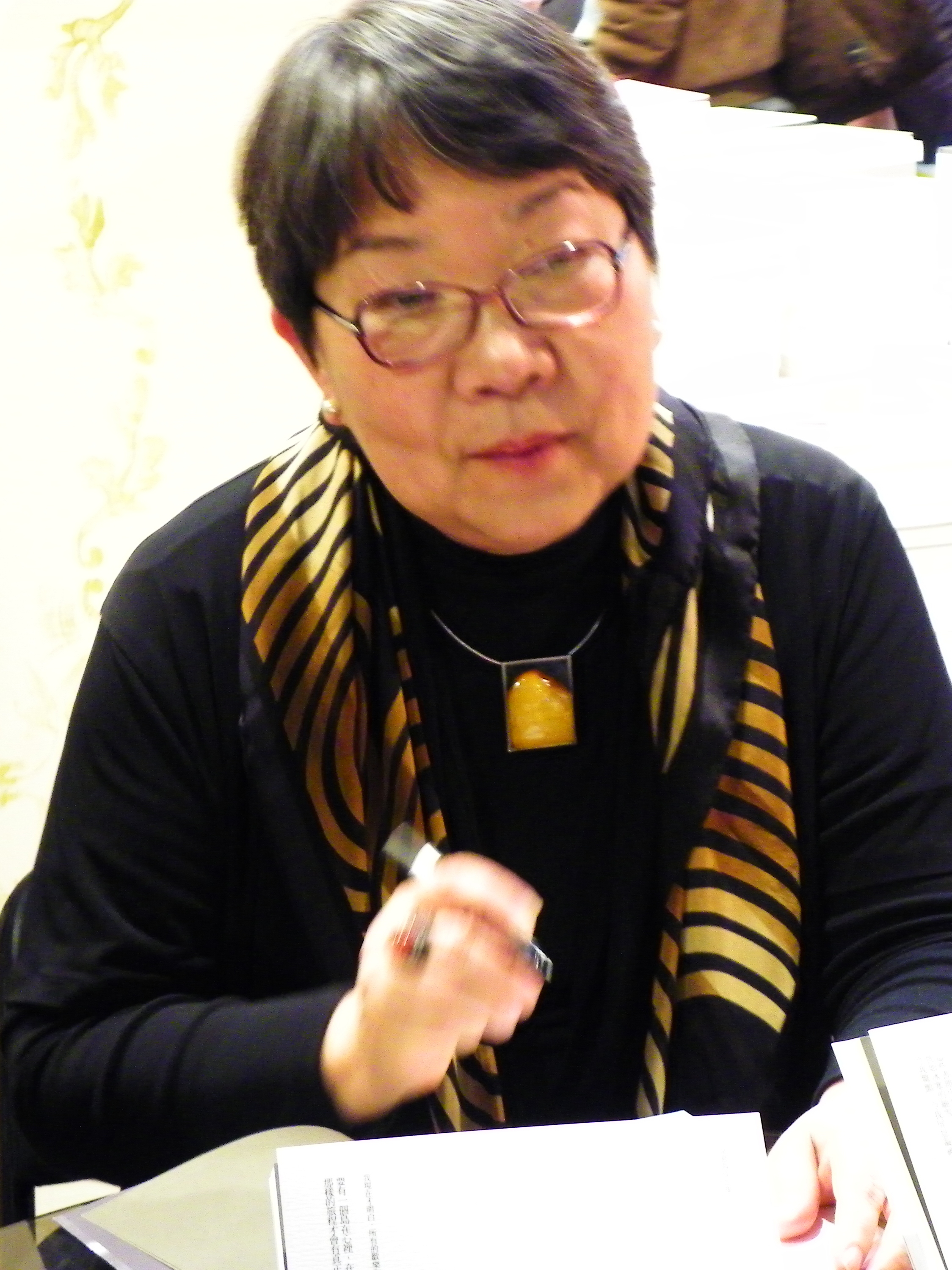 出席2013年臺北國際書展印刻出版社舉辦簽書會的席慕蓉先生。